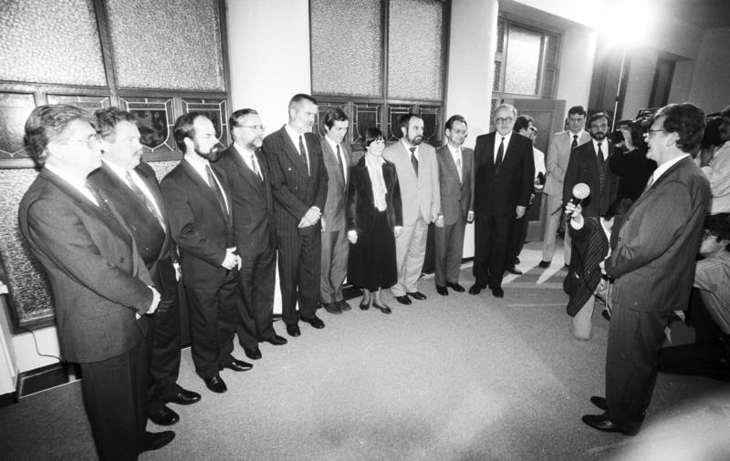 Weimar, Staatsregierung des Landes Thüringen ADN/Ralf Hirschberger/ 8.11.90/ Weimar: Die Staatsregierung des Landes Thüringen: Hans-Joachim Jäntsch (CDU-Justiz), Willibald Böck (CDU/Innenminsite), Hartmut Sieckmann (FDP-Umwelt), Dr. Ulrich Fickel ( FDP-Wissenschaft/Kultur), Dr. med. Hans-Henning Axthelm (CDU- Soziales), Dr. Klaus Zeh (CDU-Finanzen), Christine Lieberknecht (CDU-Bildung), Dr. Volker Sklenar (CDU-Landwirtschaft), Dr. Hans-Jürgen Schultz (FDP-Wirtschaft), Jochen Lengemann (CDU-Minister für besondere Angelegenheiten) v.l.n.r.; Rechts außen Ministerpräsident Josef Duchac. Abgebildete Personen: Jäntsch, Hans-Joachim: Justizminister von Thüringen, CDU, Bundesrepublik Deutschland Böck, Willibald: Innenminister des Landes Thüringen, CDU, Bundesrepublik Deutschland Sieckmann, Hartmut: 1990 Minister für Umwelt in Thüringen, FDP, DDR Fickel, Ulrich: Minister für Wissenschaft und Kultur in Thüringen, CDU, Bundesrepublik Deutschland Zeh, Klaus: 1990 Finanzminister von Thüringen, CDU, DDR Lieberknecht, Christine: Bildungsministerin von Thüringen, CDU, Bundesrepublik Deutschland Sklenar, Volker: 1990 Landwirtschaftsminister in Thüringen, CDU, DDR Schultz, Hans-Jürgen: 1990 Wirtschaftsminister des Landes Thüringen, FDP, Bundesrepublik Deutschland Lengemann, Jochen: Minister für besondere Aufgaben, Thüringen, CDU, Bundesrepublik Deutschland (GND 122195159) Duchac, Josef: Ministerpräsident von Thüringen, CDU, Bundesrepublik Deutschland